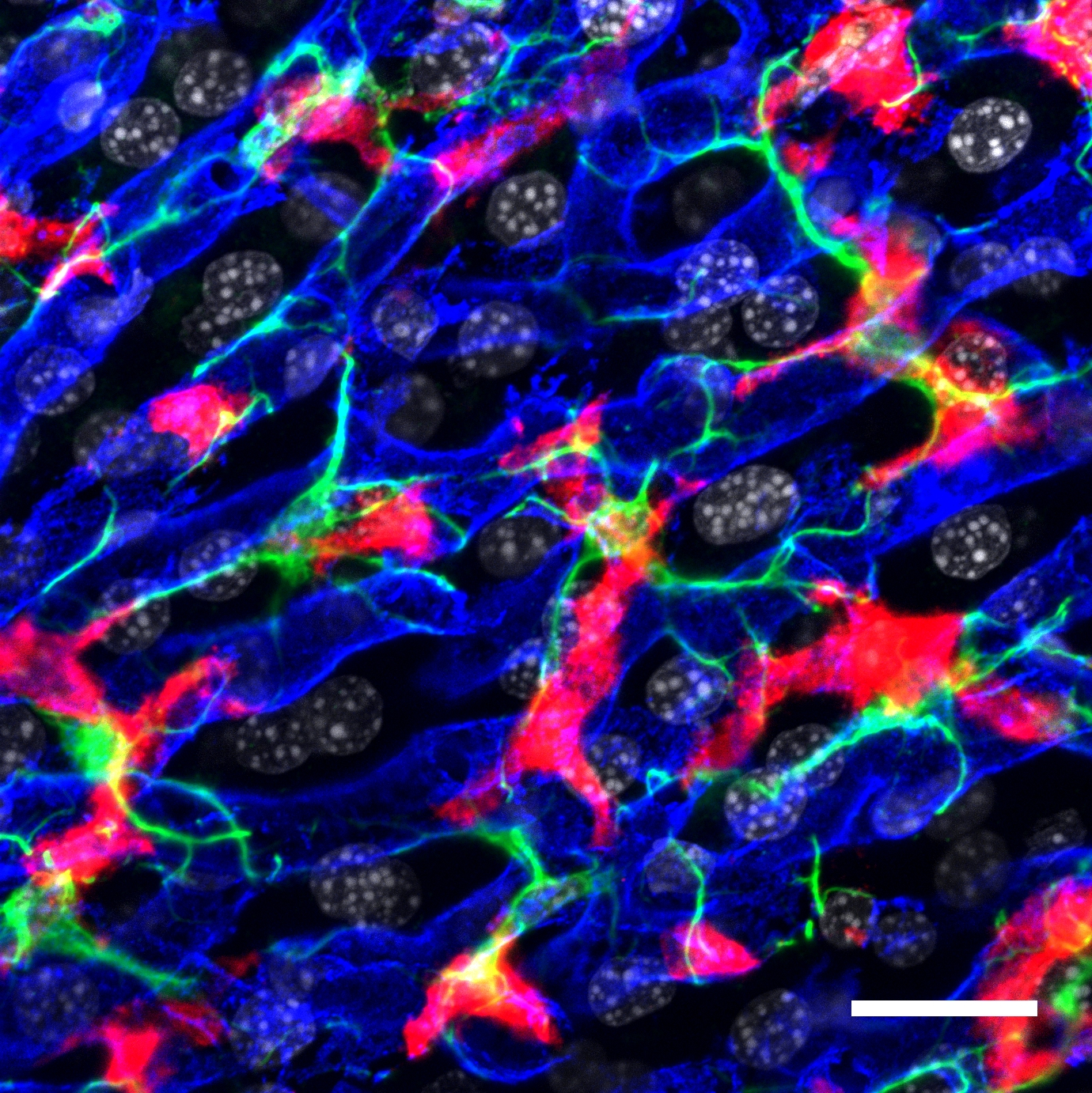 Kupffer cells were stained with an anti-CLEC4F (red), Stellate cells were stained with an anti-Desmin (green), endothelial cells were stained with an anti-CD31 (blue) and nuclei were stained with DAPI (grey).